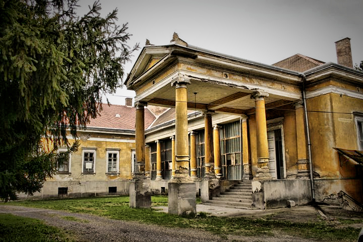 Putnok Serényi kastély bejárat This is a photo of a monument in Hungary. Identifier: 3044